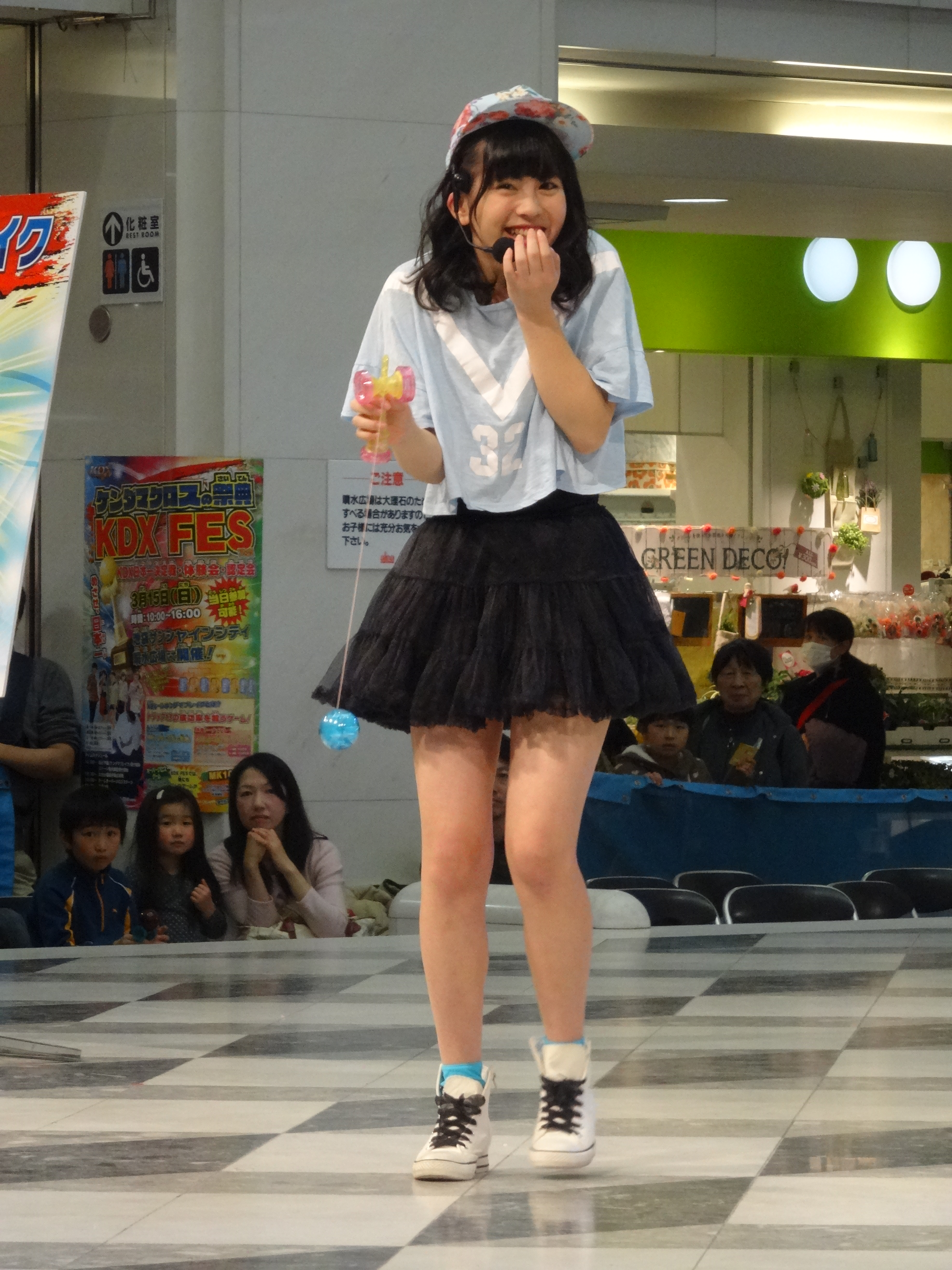 三好杏依(おはガールふわわ)。2015年3月15日にサンシャインシティで行われた『KDX FES 日本一決定戦』にて。